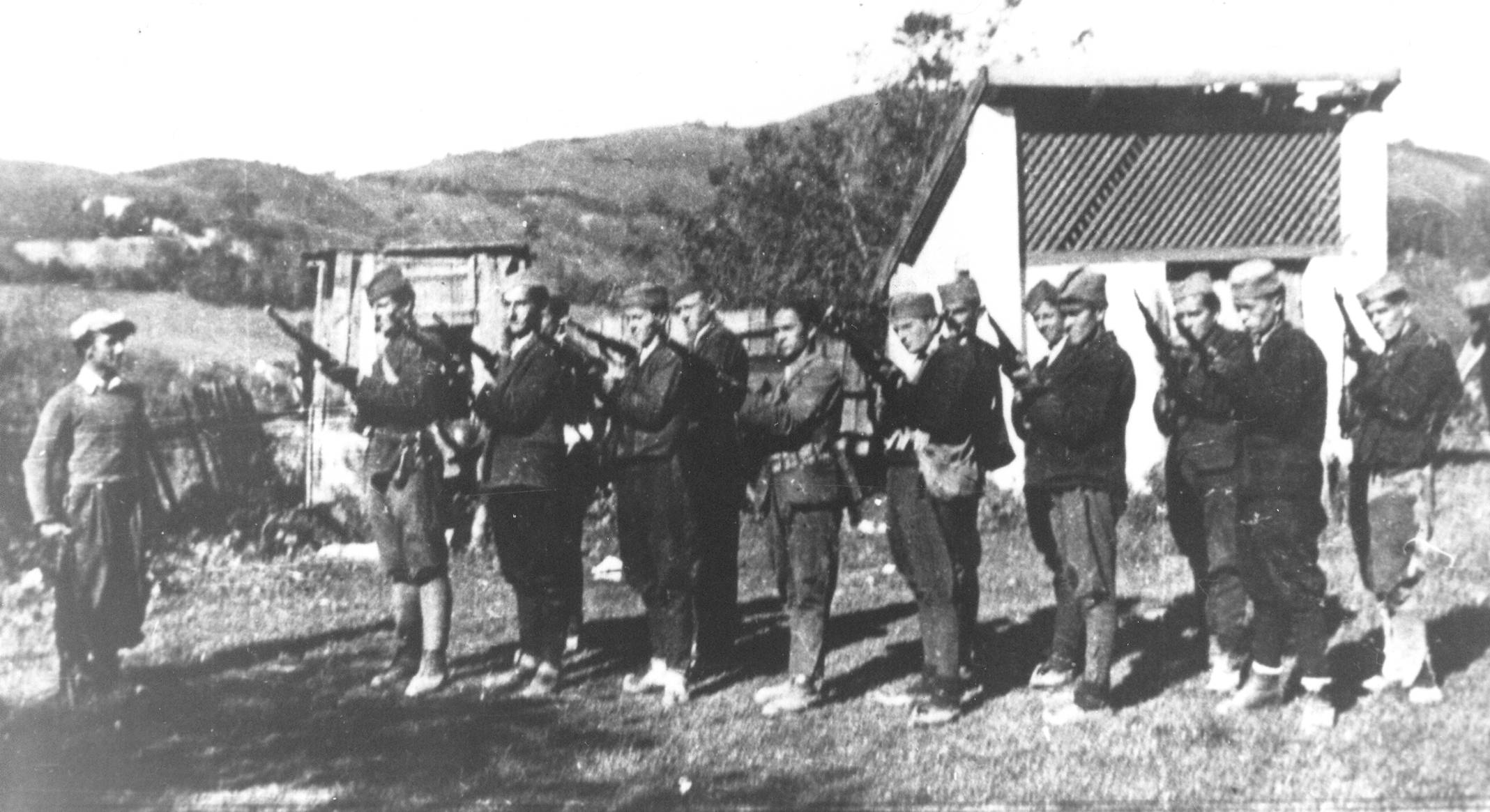 Srpskohrvatski / српскохрватски: Jedan vod Rudničke čete Čačanskog NOP odreda obučava se u rukovanju oružjem (početak septembra 1941).